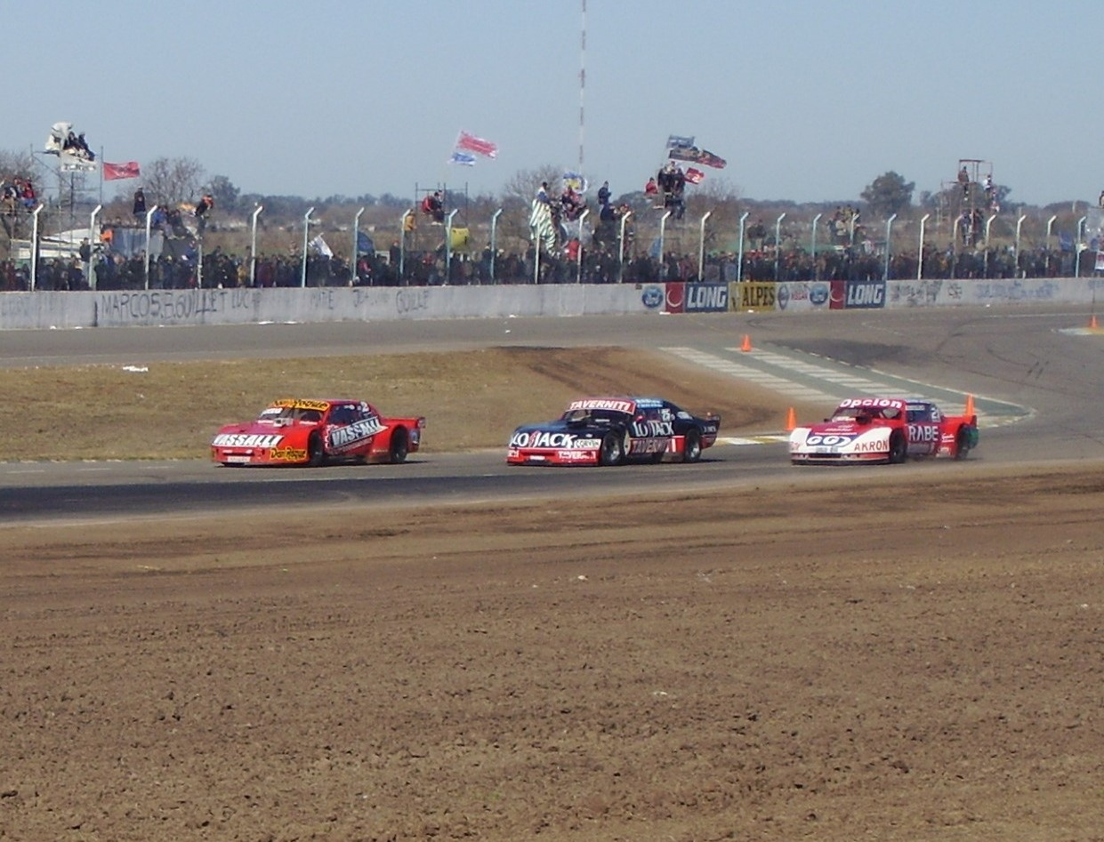 Los hermanos Patricio (Torino), Marcos (Chevy) y José Luis Di Palma (Torino) en el Autódromo de Rafaela, antes de comenzar la final de la décima fecha de la Temporada 2007 de Turismo Carretera.